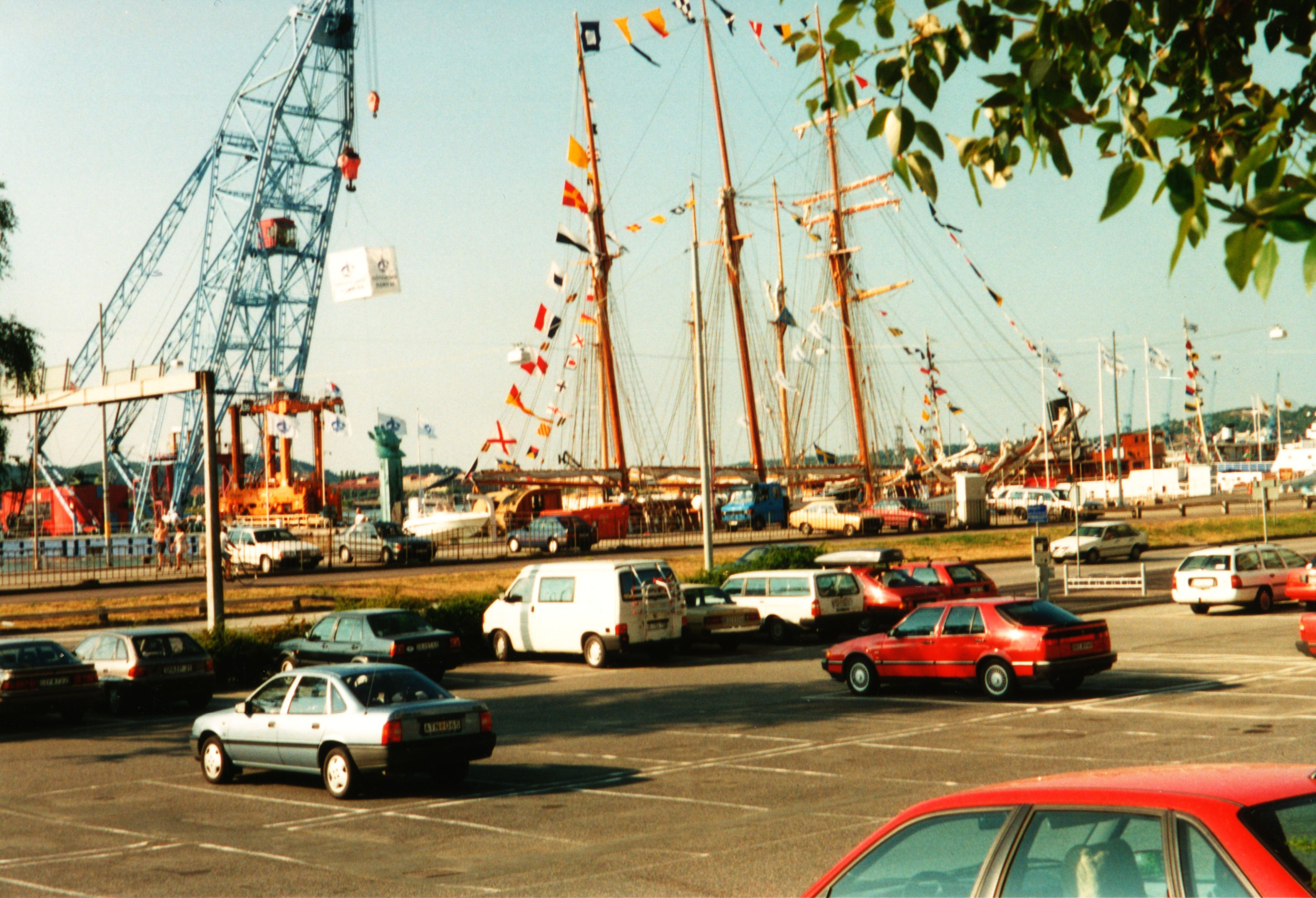 Kajen vid Stora Badhusgatan (1980-talet)